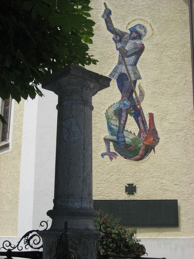 Mosaik an der Fassade der Pfarrkirche Schruns/Austria Künstler : Konrad Honold